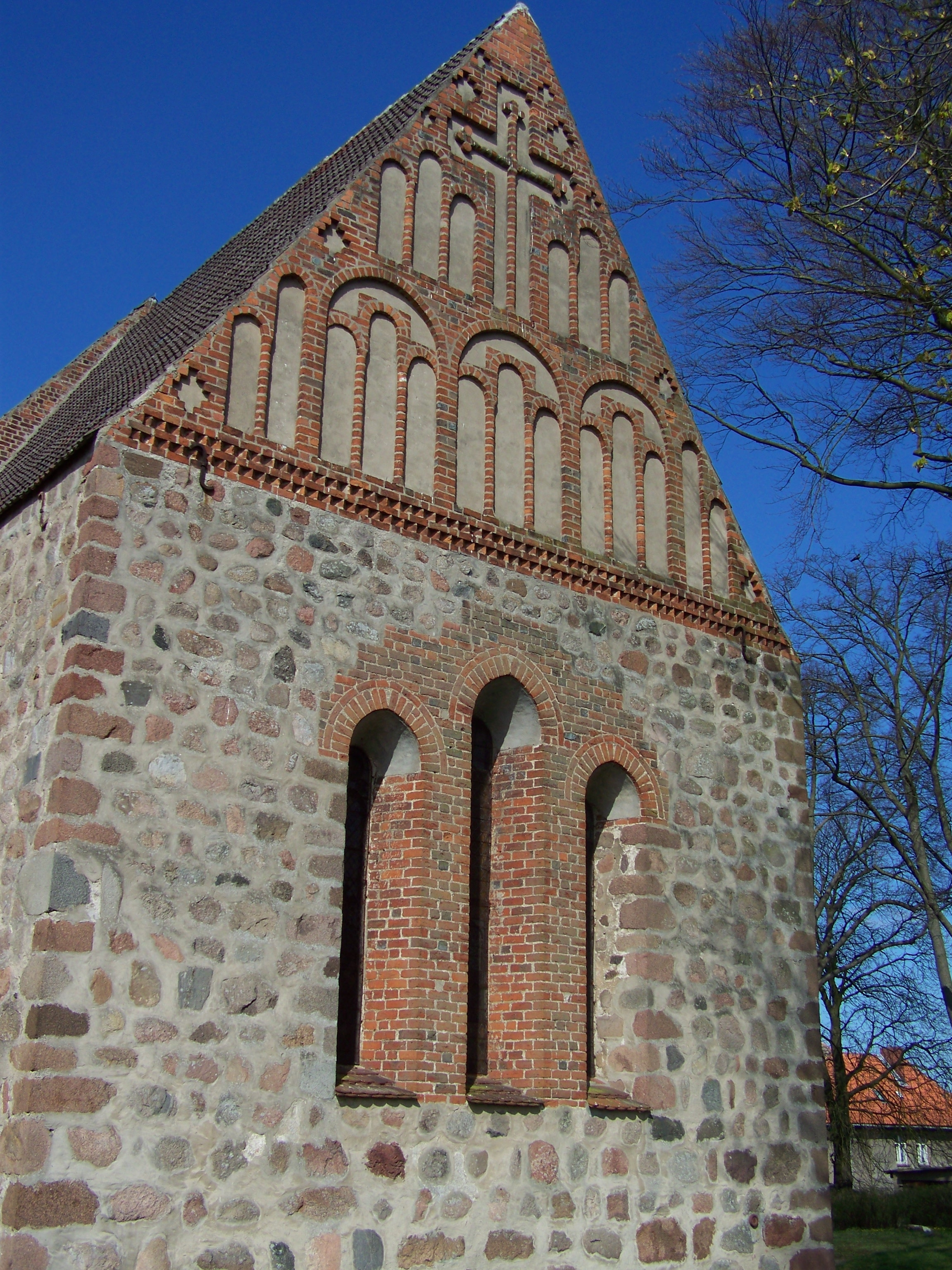 Richtenberg, Kirche - Giebelansicht Schiff (2008-04-20)